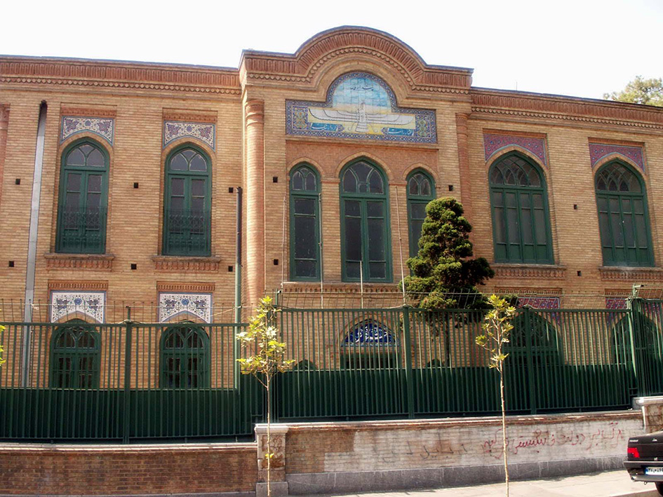 دبیرستان فیروزبهرام